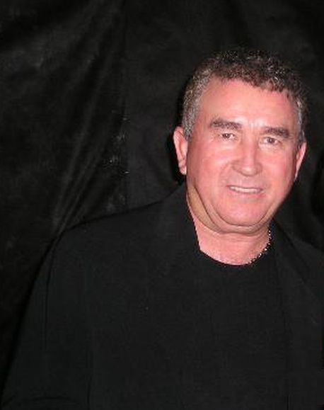 O cantor brasileiro Amado Batista, antes de ser entrevistado no programa radiofônico de Natália (Nathy) Silva. No original, Amado aparece ao lado da jornalista.